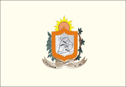 Bandeira da cidade de Areial na Paraíba.